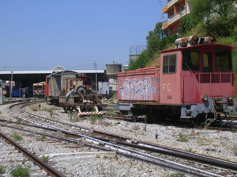 Spintori a cremagliera e deposito a Catanzaro Città